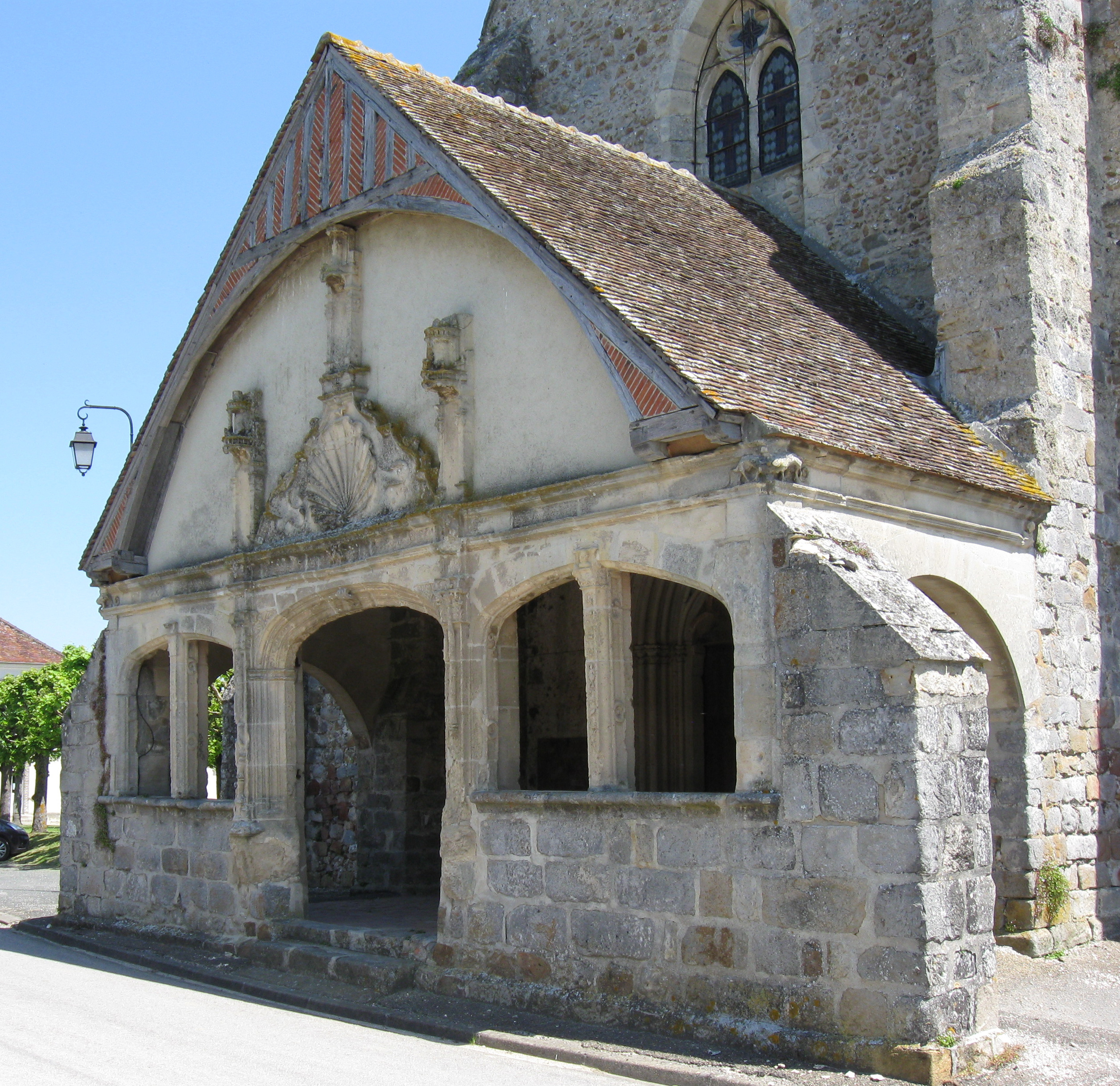 Porche de l'église Notre-Dame-de-l’Assomption de Villenauxe-la-Petite. (département de la Seine-et-Marne, région Île-de-France).